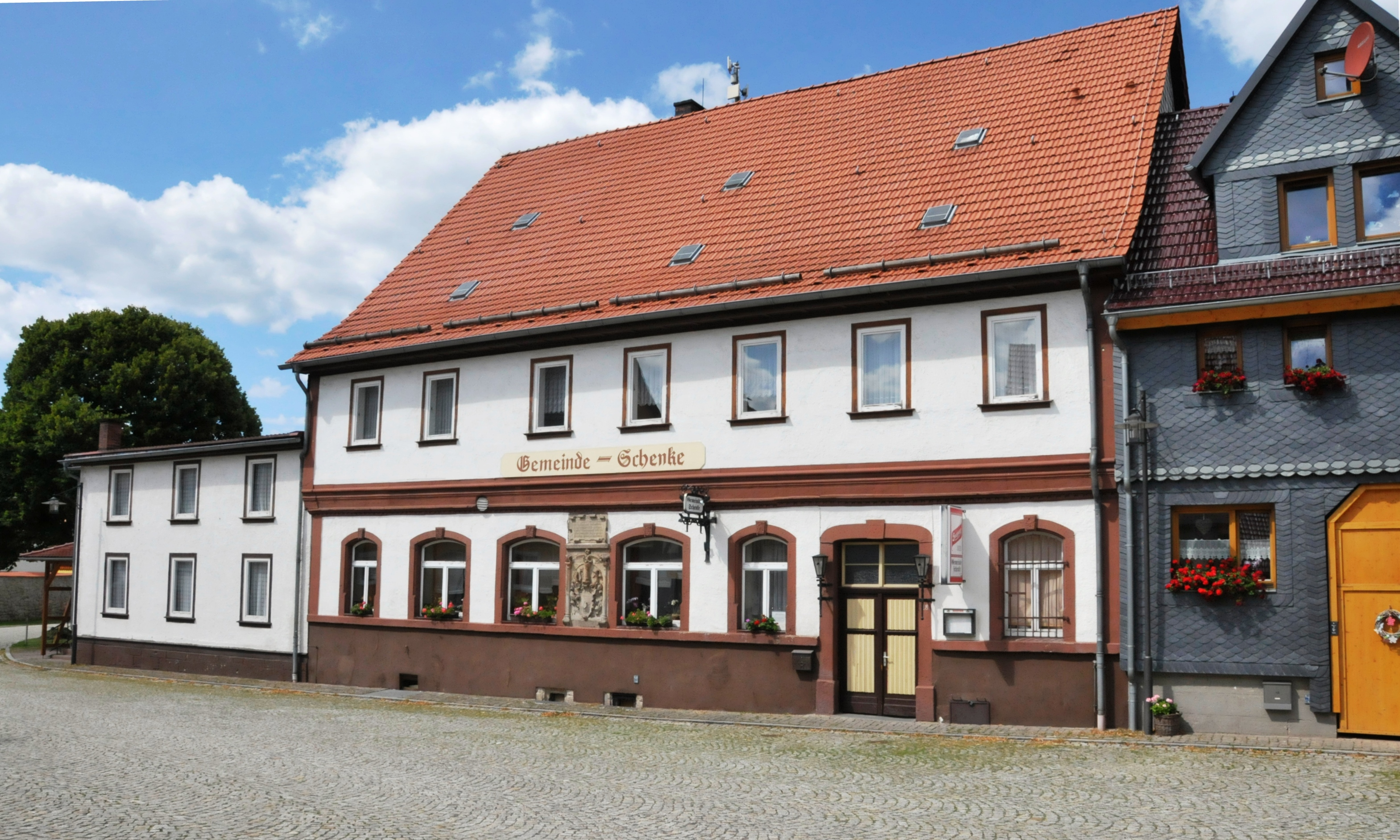 Crawinkel, Am Markt, Gemeindeschenke